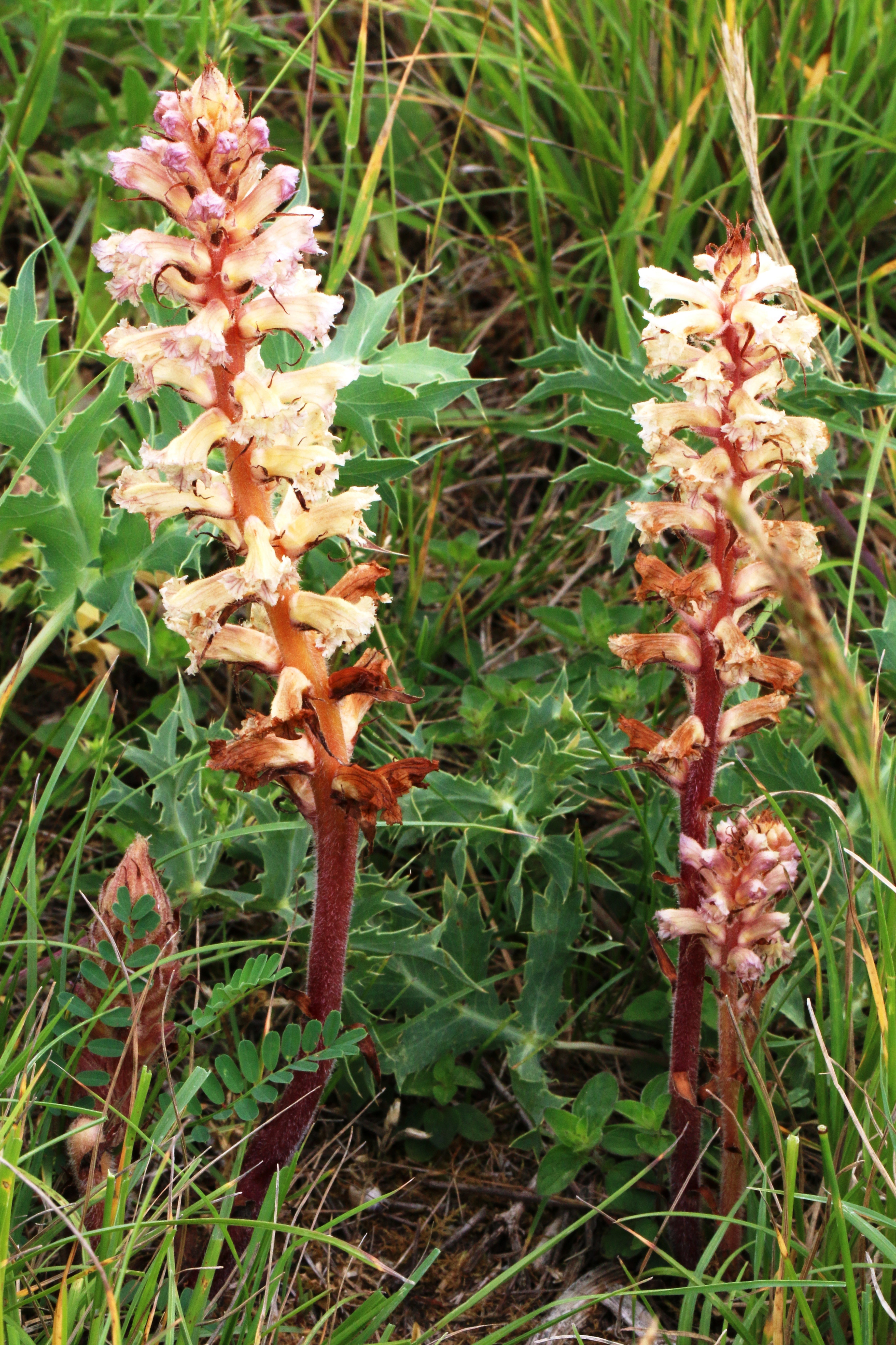 Amethyst-Sommerwurz (Orobanche amethystea) parasitierend am Feldmannstreu, Fundort: Kraichgau, Juni 2020